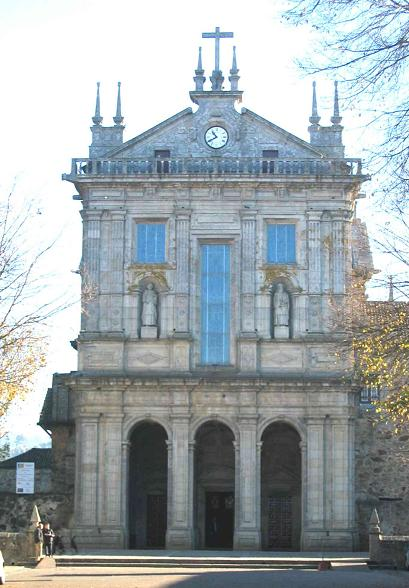 Monastery of Grijó - Mosteiro de Grijó